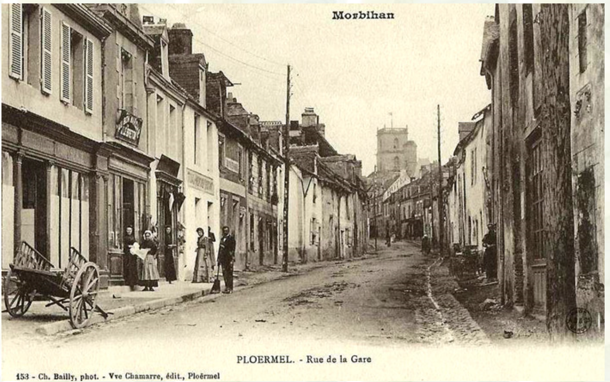 Carte postale illustrant la rue de la gare à Ploërmel.